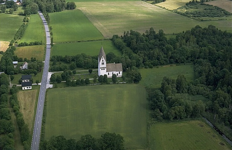 Lojsta kyrka Motiv: Lojsta Nyckelord: Flygbilder, Riksintressen Kategori: Kyrkomiljö Lojsta kyrka. Länsväg 142 går förbi väster om kyrkan.